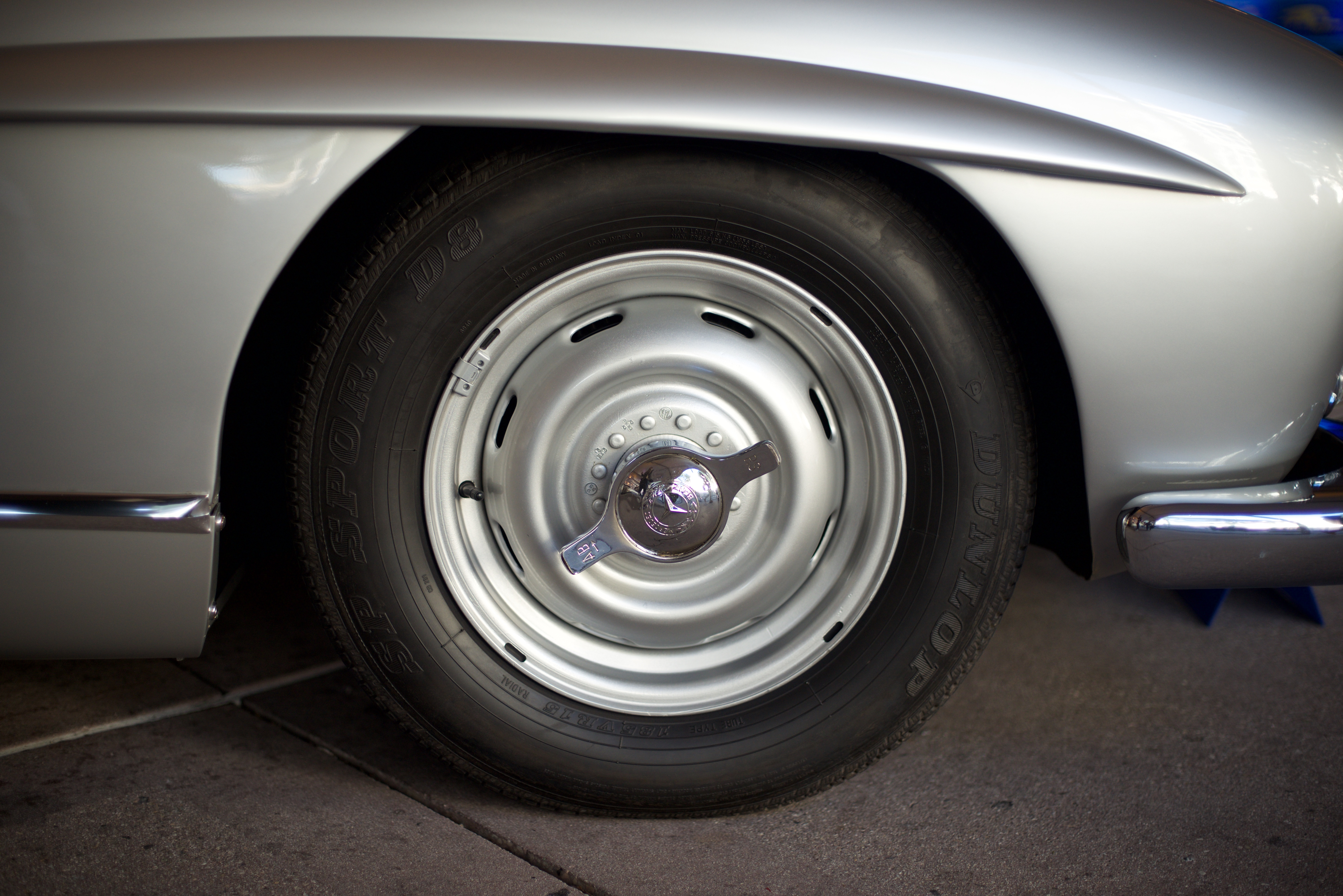 SLY_5592